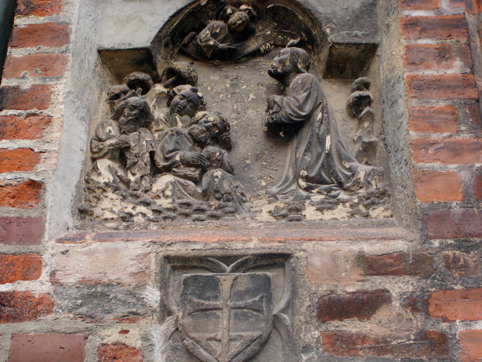 Ölbergrelief an der Frauenkirche